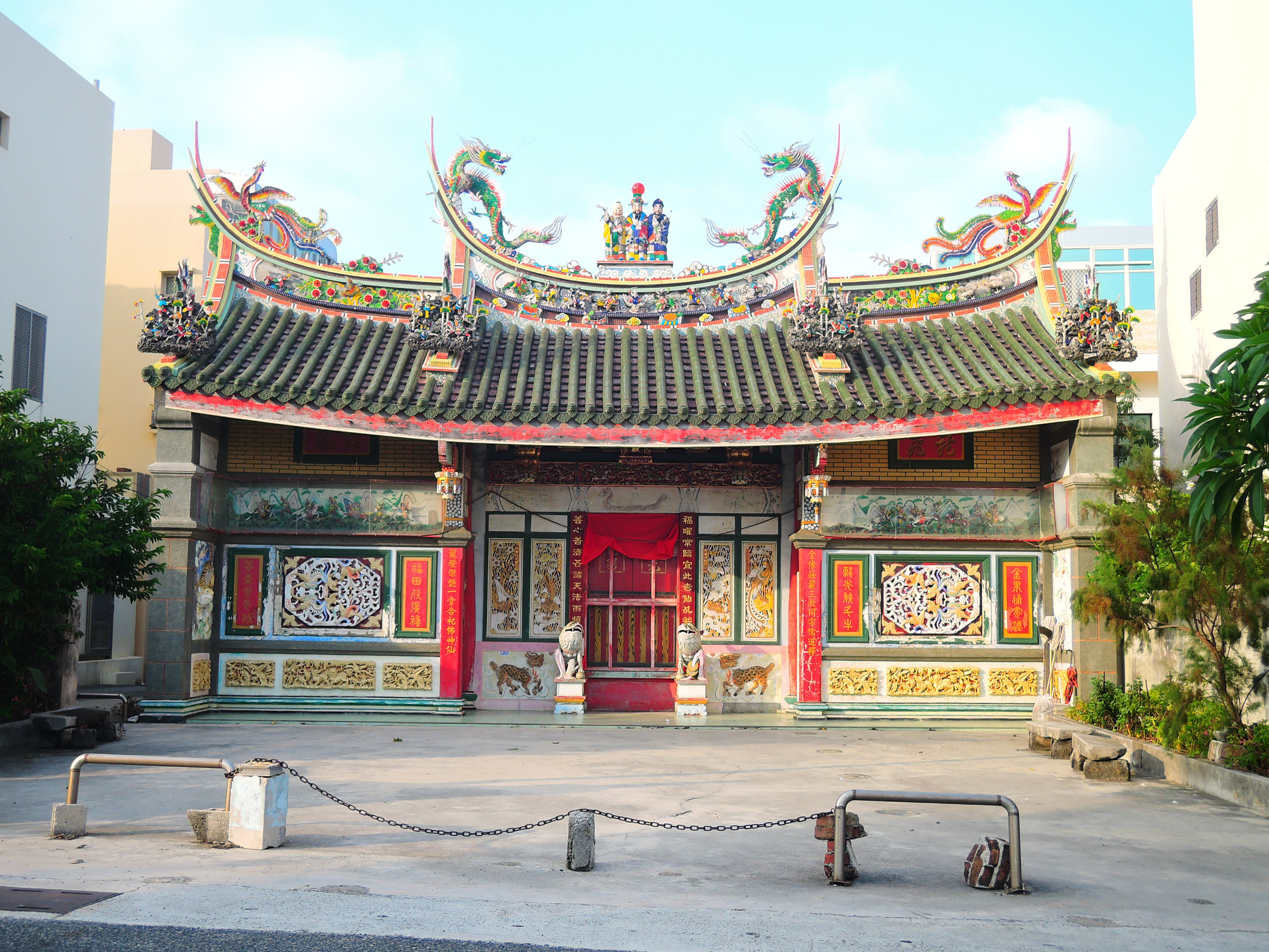 舊西衛金龍殿